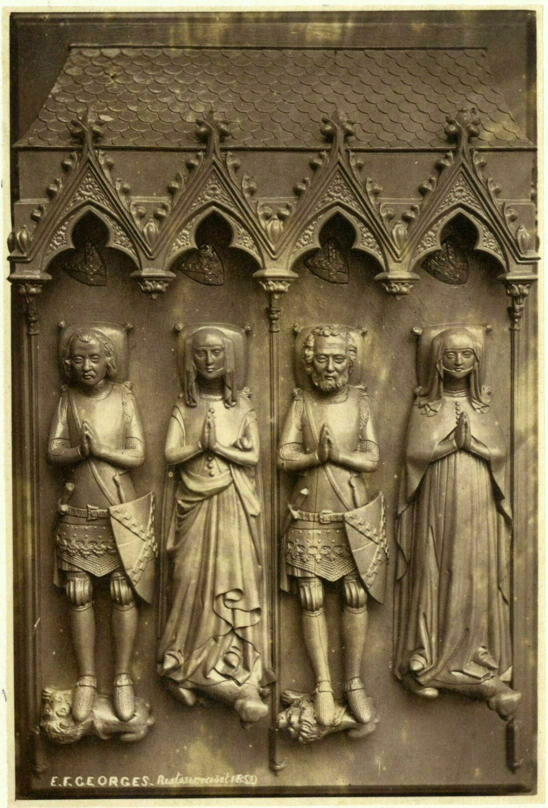 Afbeelding van de graftombe van Gijsbrecht van Amstel van IJsselstein, Bertha van Heukelom, Arnold van IJsselstein en Maria van Henegouwen in de N.H. Nicolaaskerk (Kerkhof) te IJsselstein, na de restauratie door de beeldhouwer/fotograaf E. F. Georges.